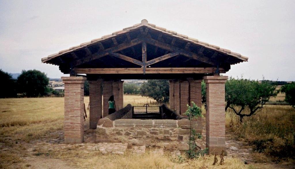 Pozo de Ponzano (Huesca, España).